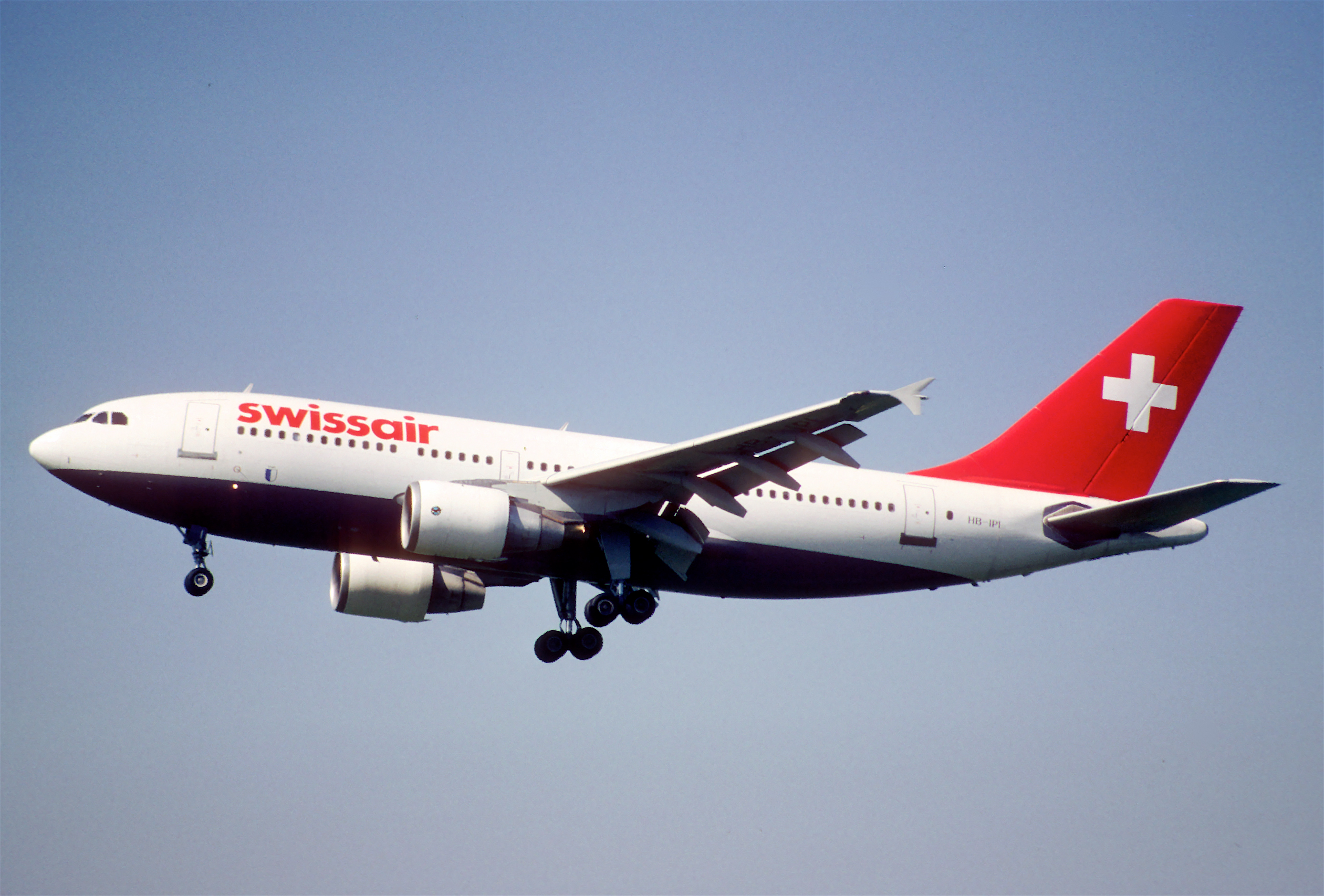 36ba - Swissair Airbus A310-322; HB-IPI@ZRH;09.08.1998